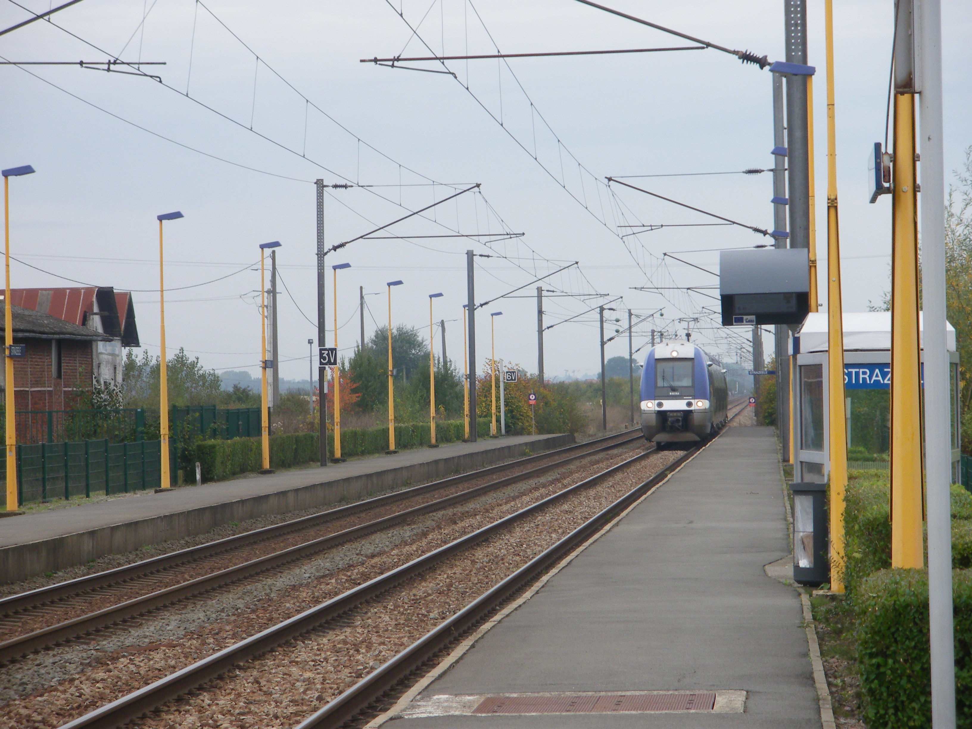 Vue de la gare de Strazeele : TER arrivant en gare.